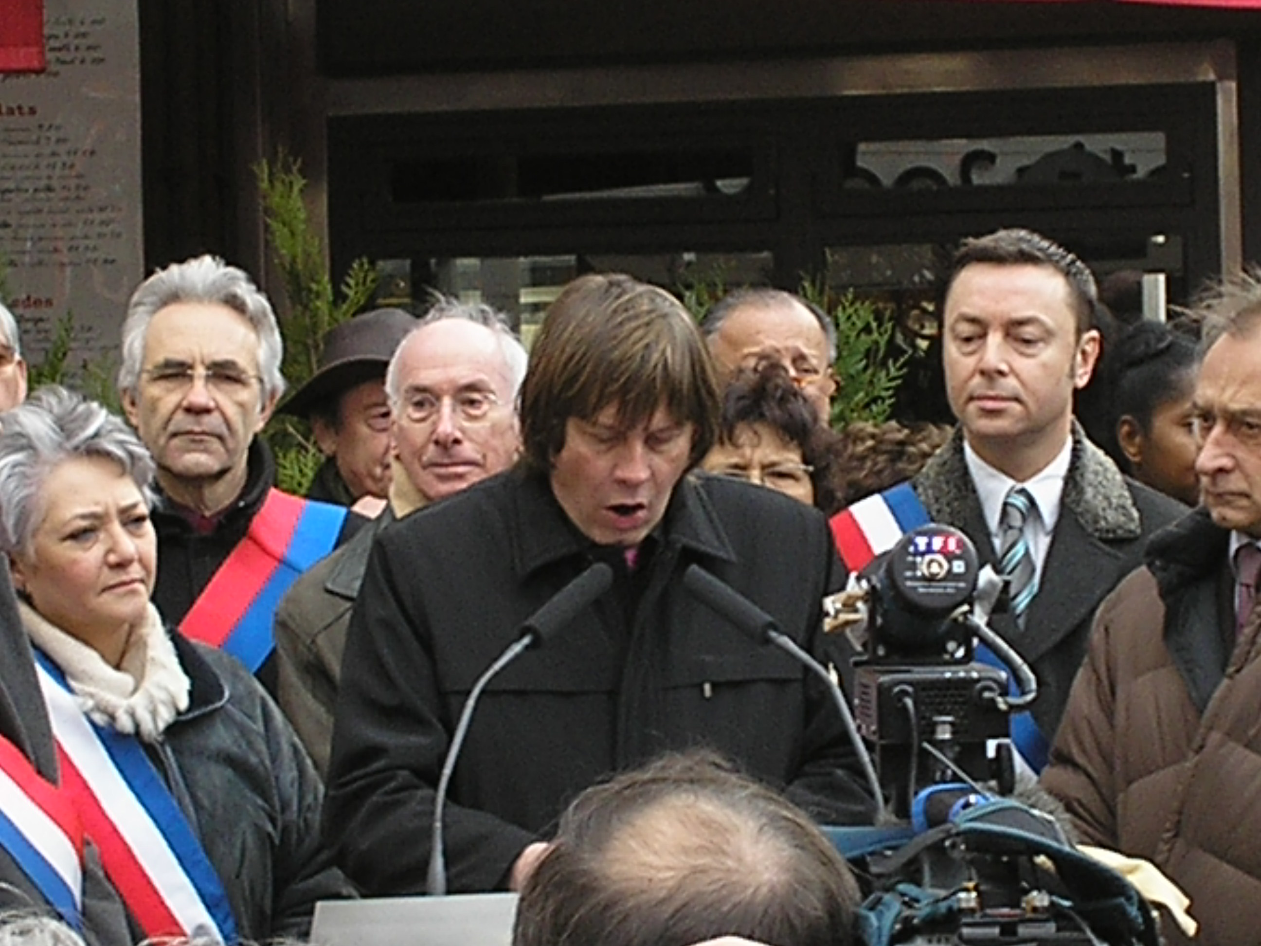 Inauguration de la place du 8 février 1962, allocution de Bernard Thibault, secrétaire général de la CGT Paris, France.